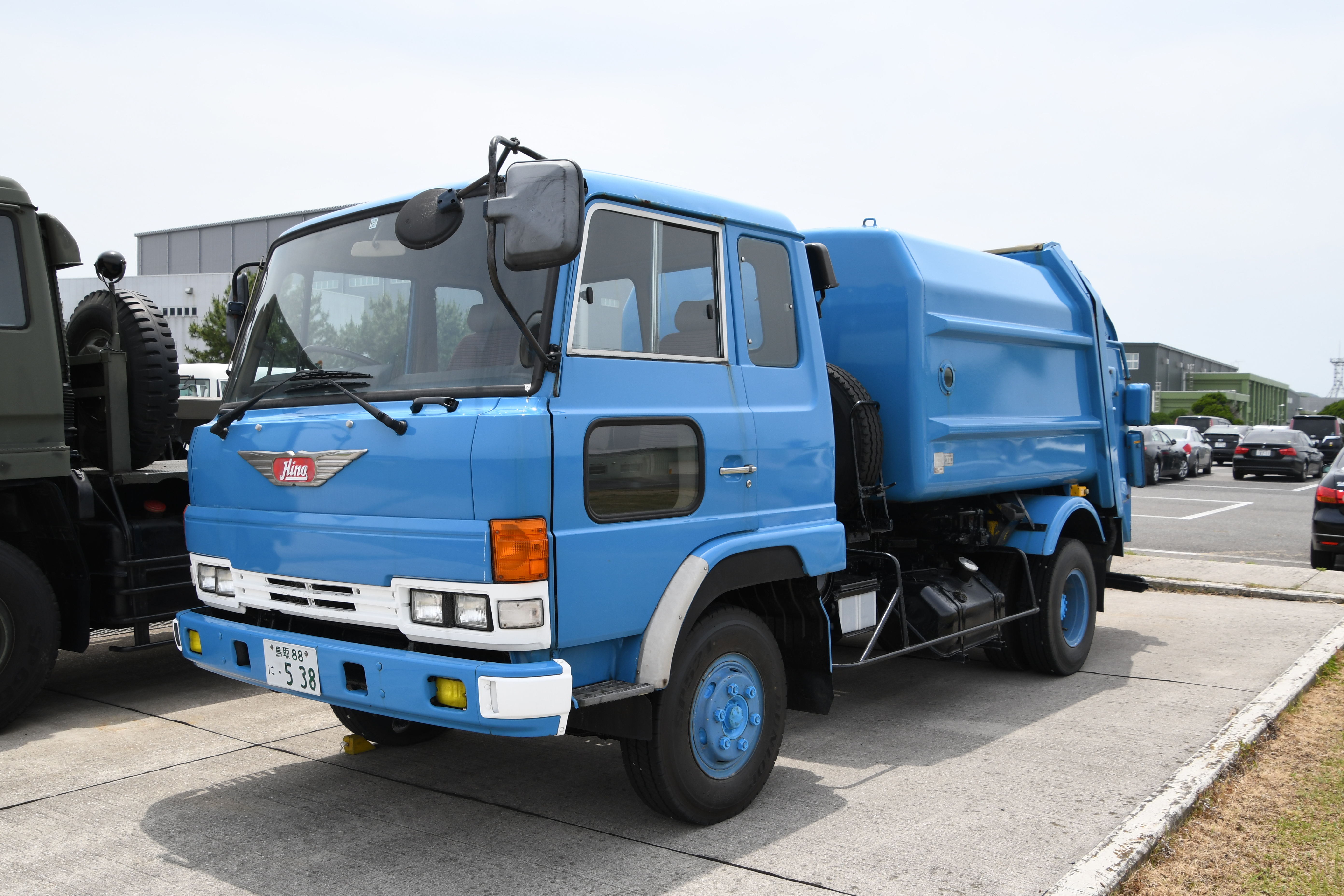 ごみ収集車（日野・レンジャー） 右前面。2018年5月27日 航空自衛隊美保基地にて。